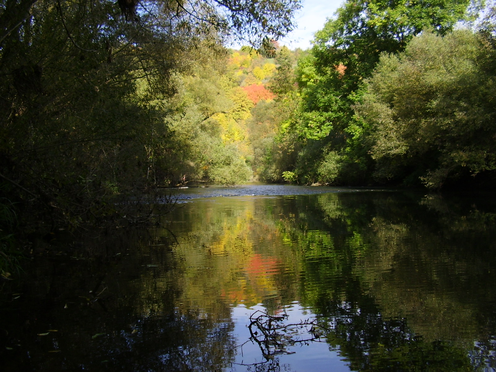 Jagst zwischen Ruchsen und Möckmühl.